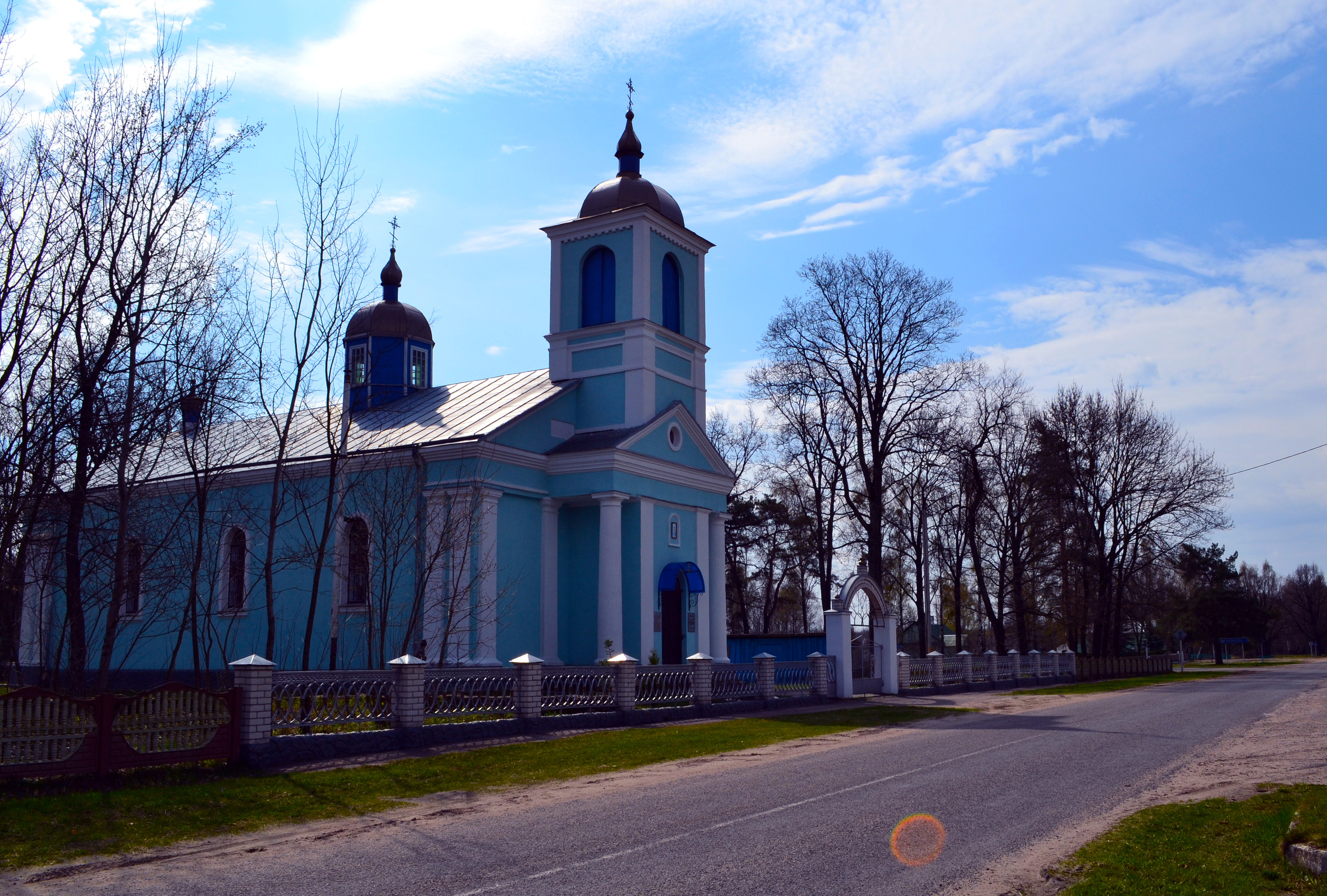 Беларуская (тарашкевіца): Пакроўская царква. в. Гарадзечна This is a photo of Belarusian heritage monument. Reference number: 113Г000607 ( WLM)